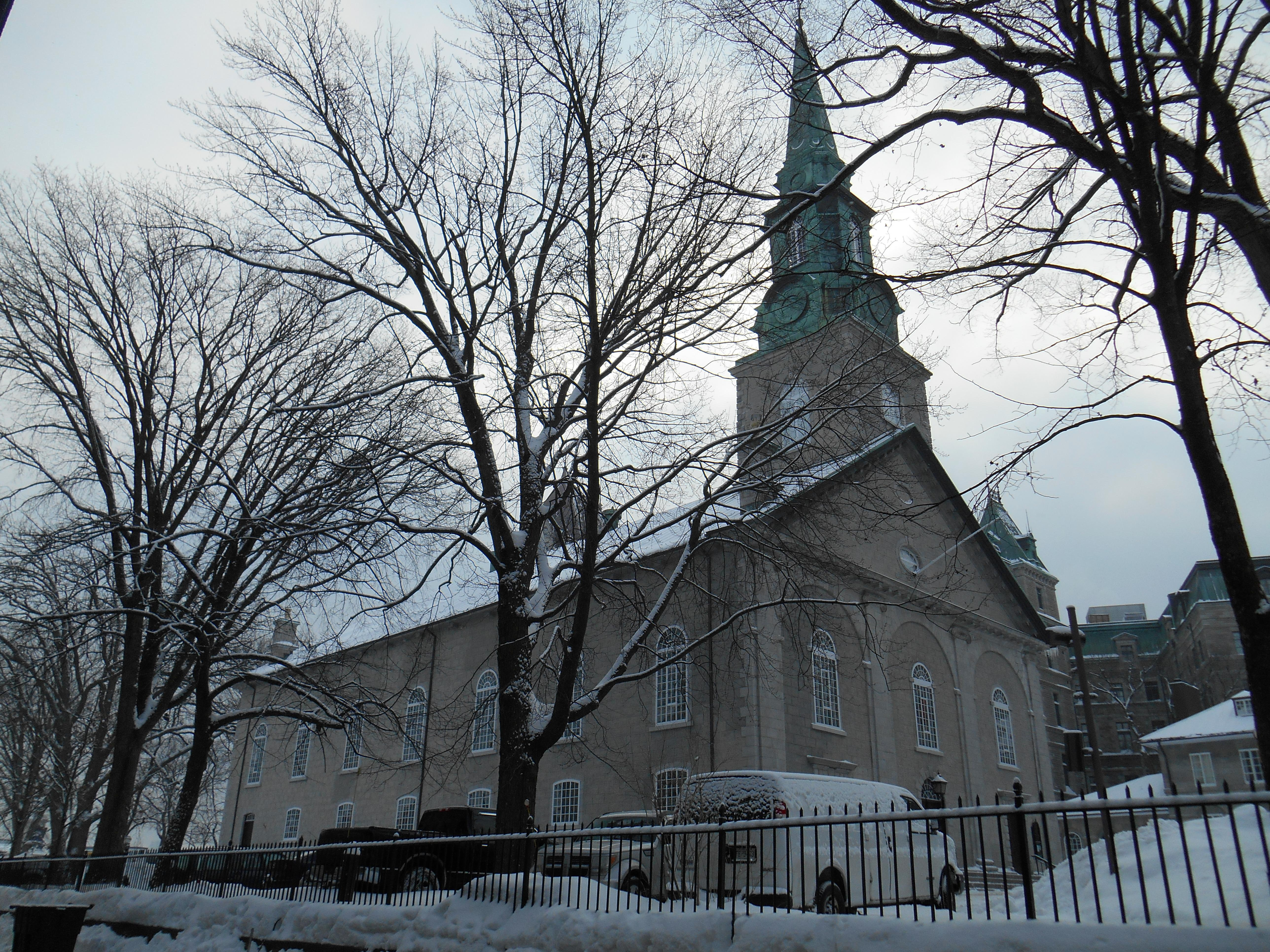 Cathédrale de la Sainte-Trinité, Québec